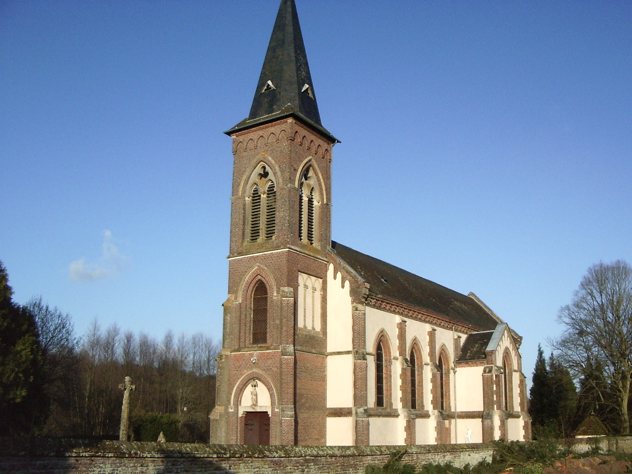 Hermival les Vaux Eglise 1